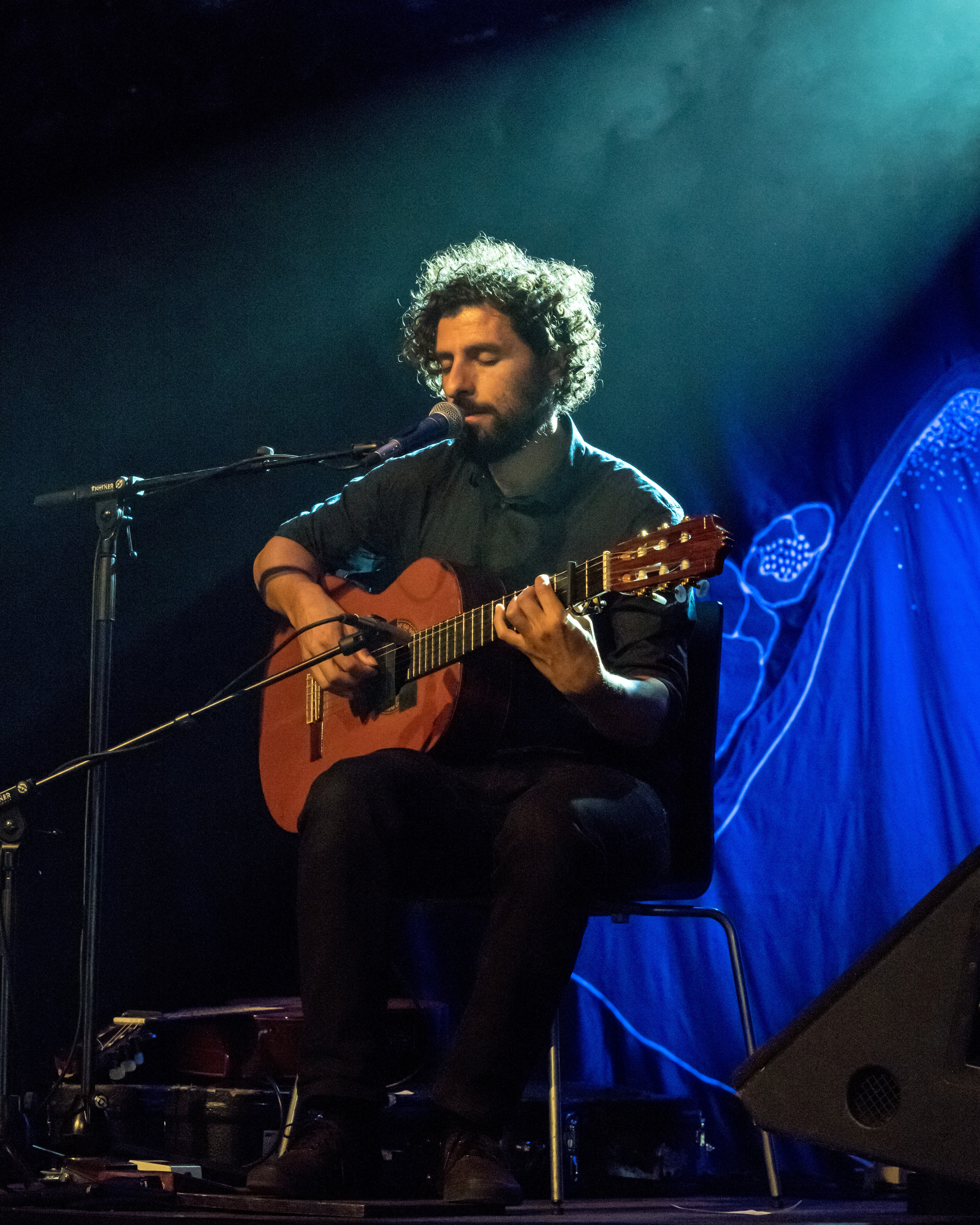 Bilder vom Zelt Musik Festival 2017 in Freiburg im Breisgau José González am 13.07.2017